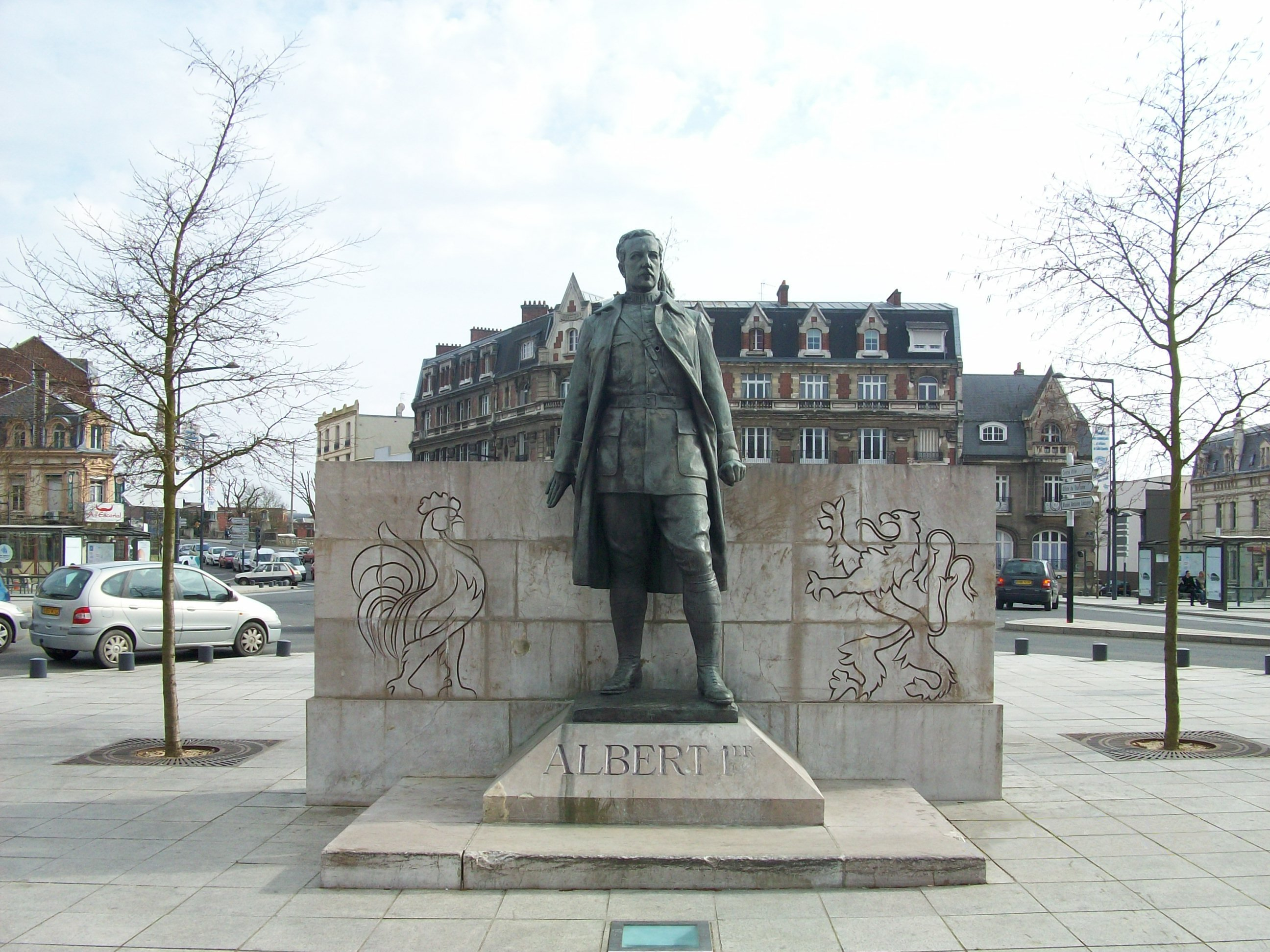 Statue du roi Albert Ier de Belgique, par Ernest-Charles Diosi (1881-1937). Photographiée à Saint-Quentin dans l'Aisne Place du 8 octobre 1870.